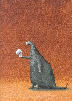 Anachronism